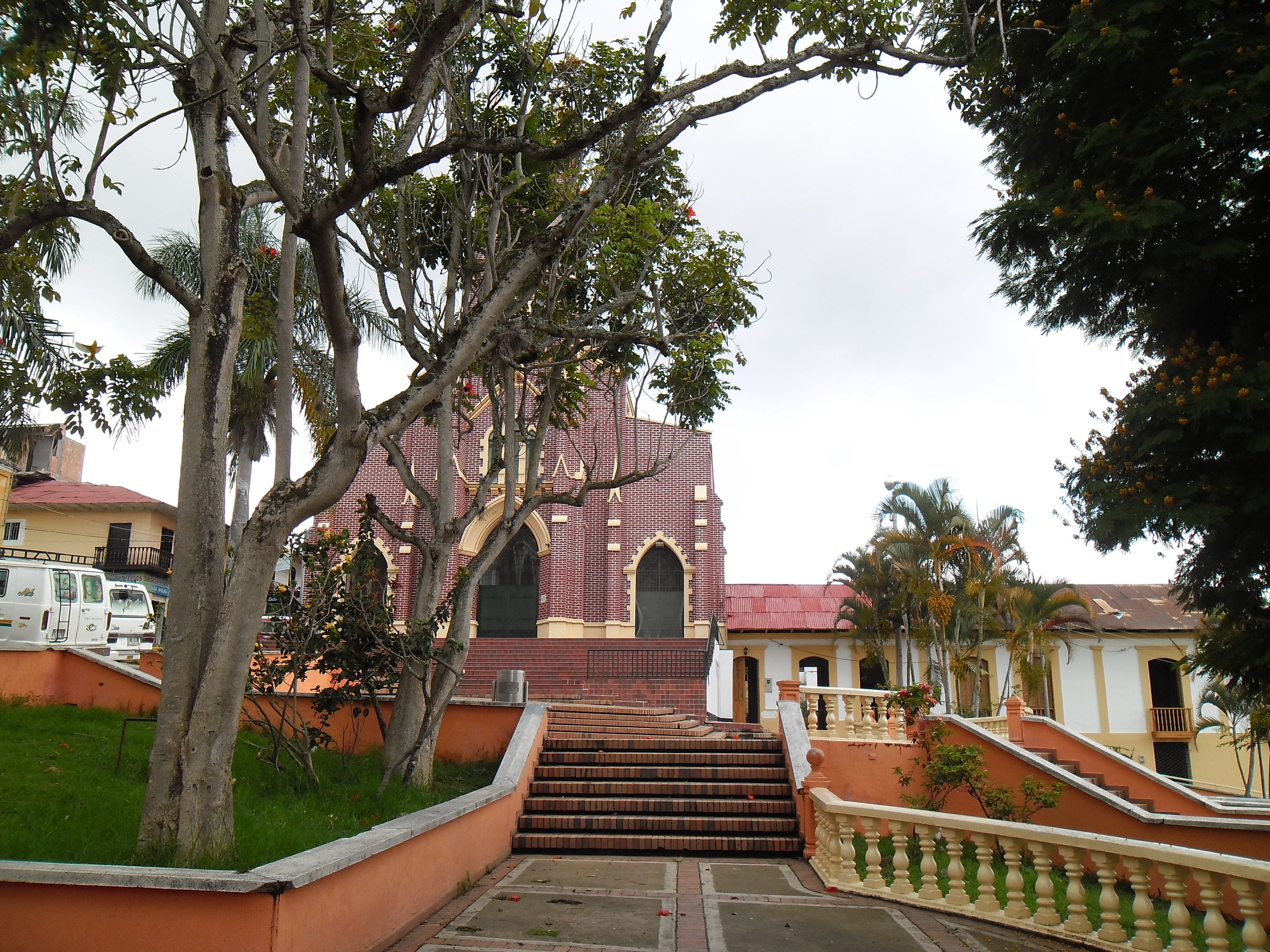 Iglesia de Icononzo. Foto tomada por Robinson Estived Alarcón cortés